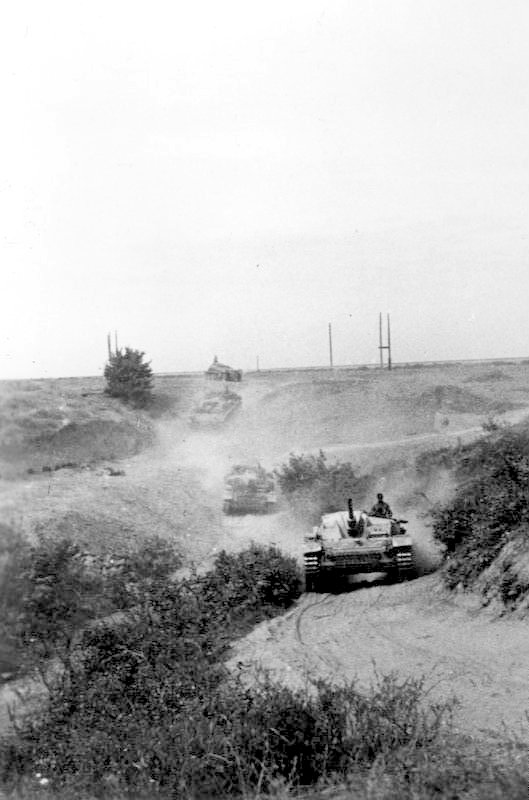 Russland, Kampf um Stalingrad, Panzer An der Sowjetfront: Kampf um Stalingrad PK-Aufnahme Kriegsberichter: Schroedter (Sch) 5447-42 "Fr. FR. OKW." September 1942 [Herausgabedatum] [Sowjetunion.- Schlacht um Stalingrad]